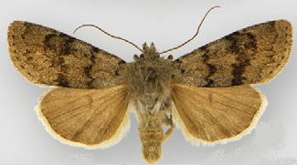 Euxoa macleani male